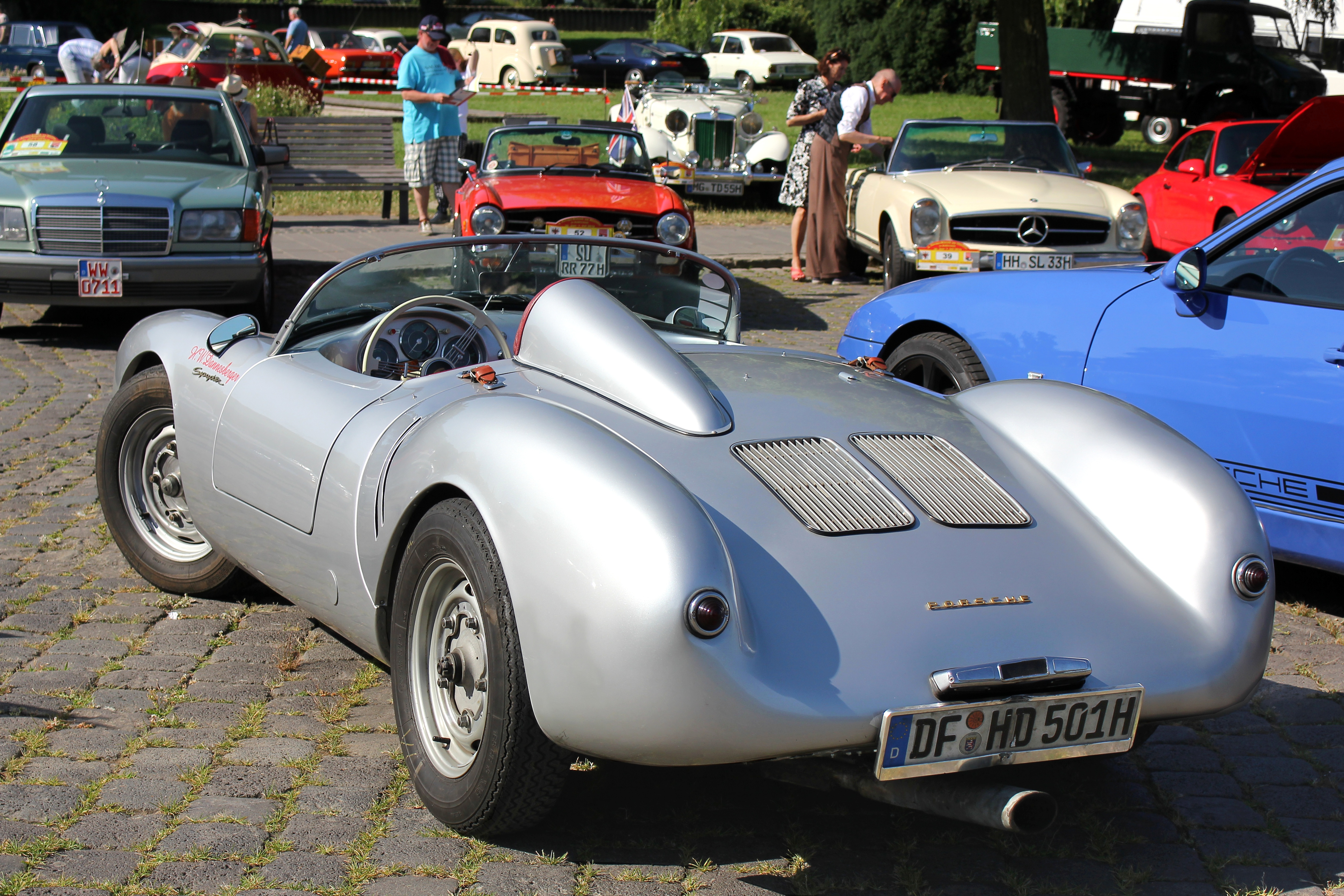 Porsche 550 A Spyder, Baujahr 1956 (Nach Auskunft des Eigentümers ist der Wagen ein Original.)